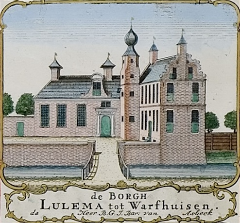 Borg Lulema in Warfhuizen. Uitsnede uit de kaart van Theodorus Beckeringh uit 1781